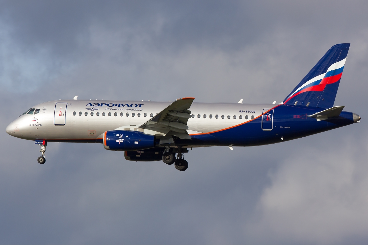 Sukhoi Superjet 100-95 (RA-89009)